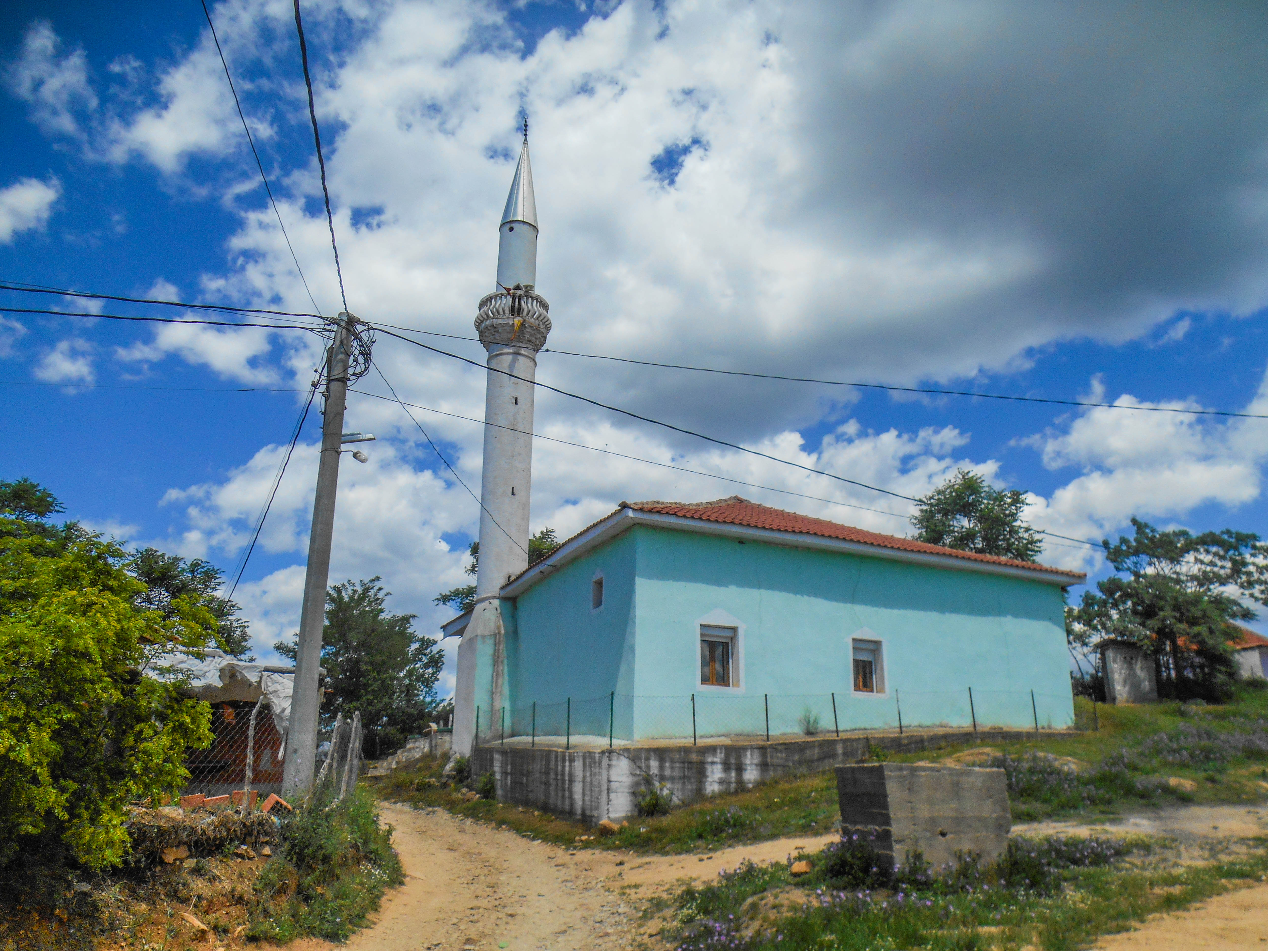 Џамија во Нова Маала